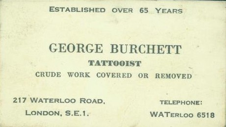 Visitenkarte des Tätowierers George Burchett um 1950